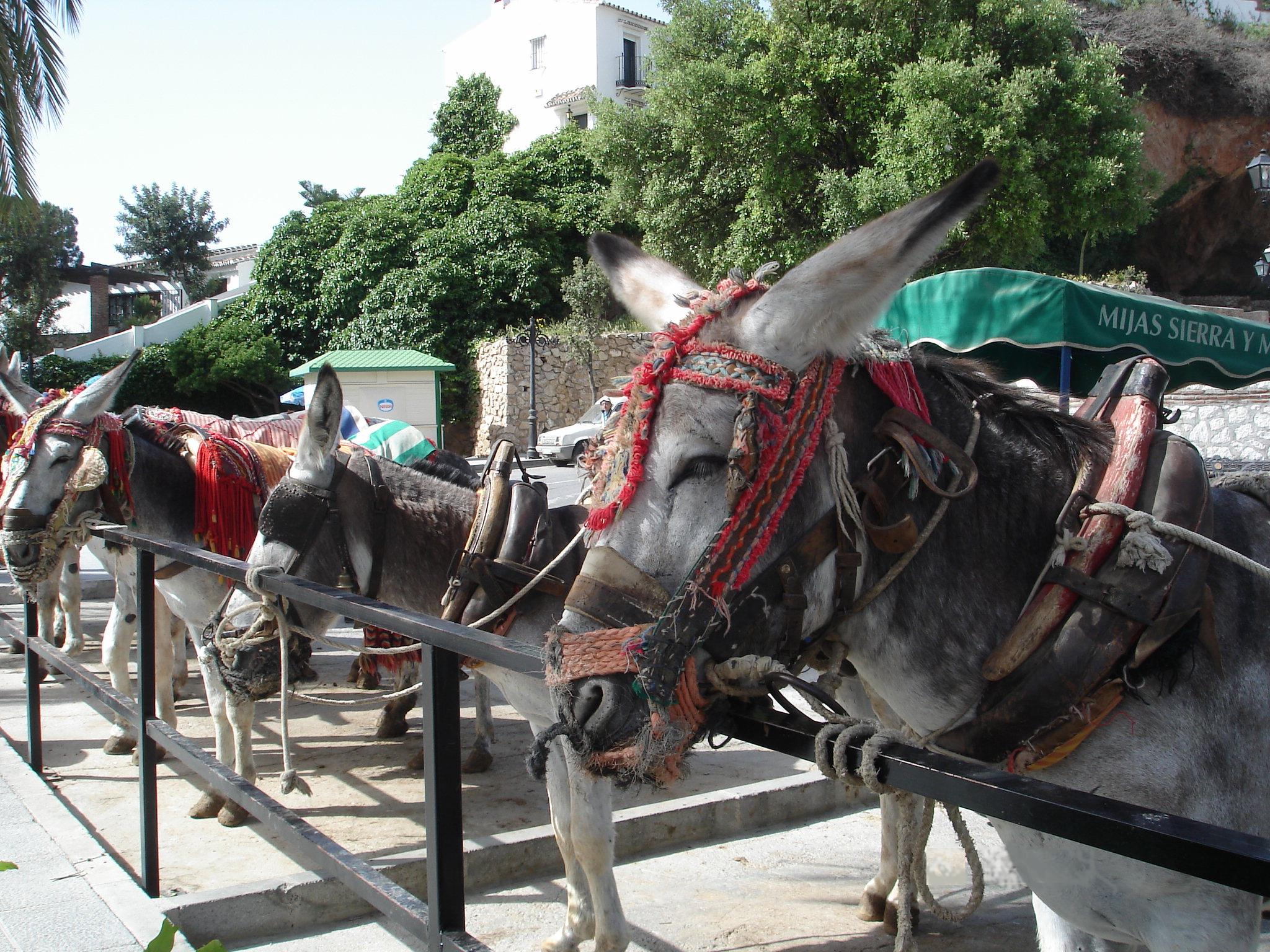 Ville de Mijas : Taxis Burros (Province de Malaga) en Espagne Auteur : Jean-Claude Perez